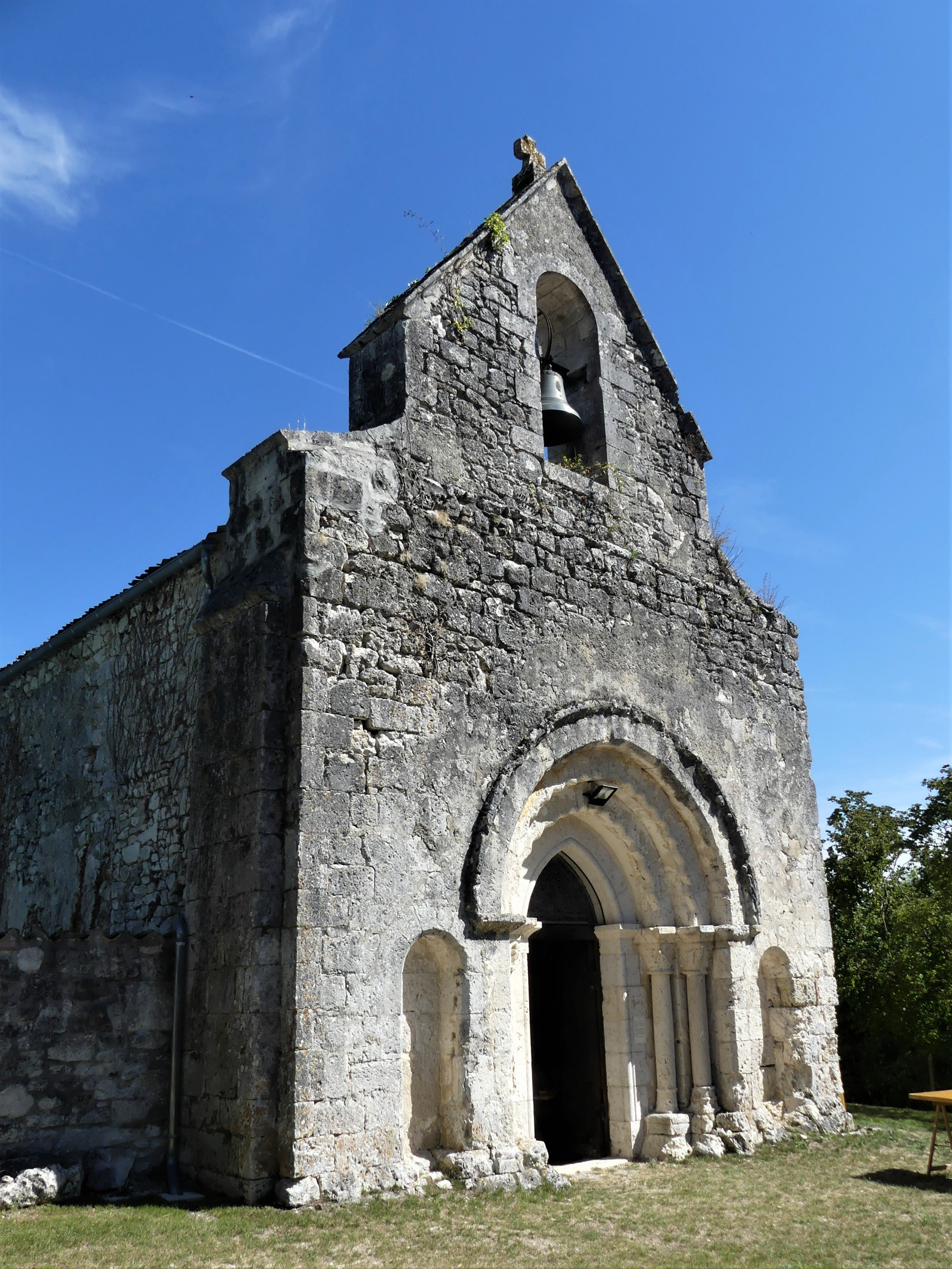 La chapelle de Cadelech, Saint-Aubin-de-Cadelech, Dordogne, France.